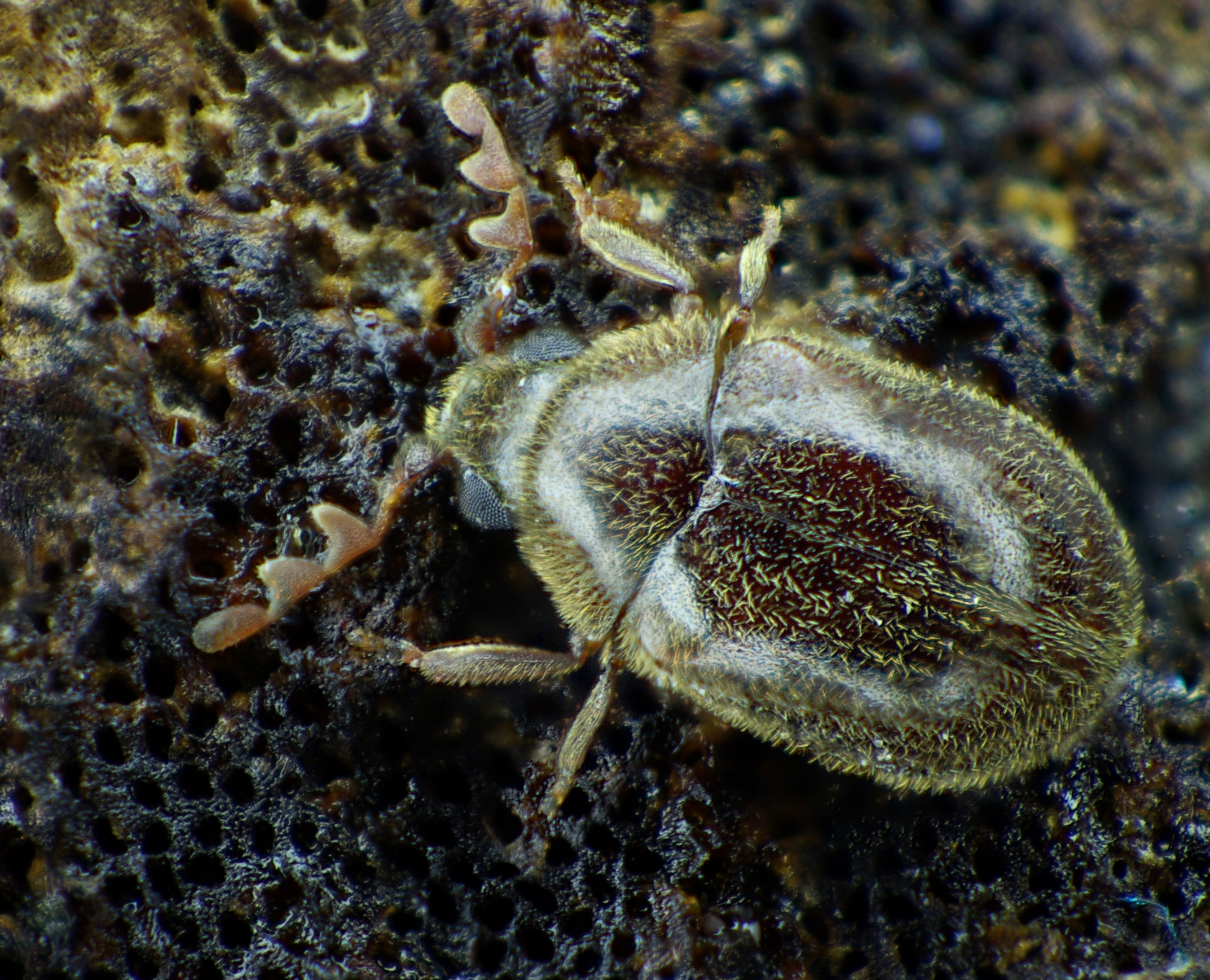 Dorcatoma substriata von Süddeutschland, zwischen Tuttlingen und Rottweil, 700 m hoch, an Baumschwamm an Pflaume Anfang Juni 2014